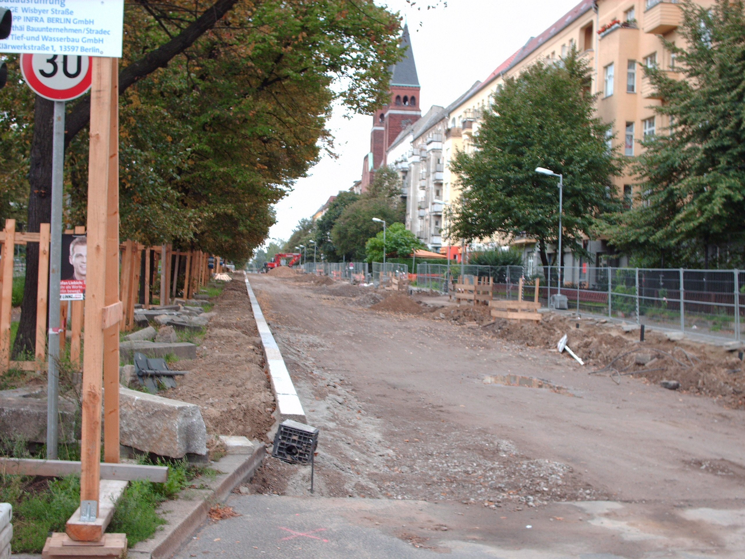 Berlin, südliche Seite der Wisbyer Straße an der Ecke Schönhauser Allee. Für 6 Millionen Euro wird in über zwei Jahren die Fahrbahn und der Gehweg komplett erneuert.